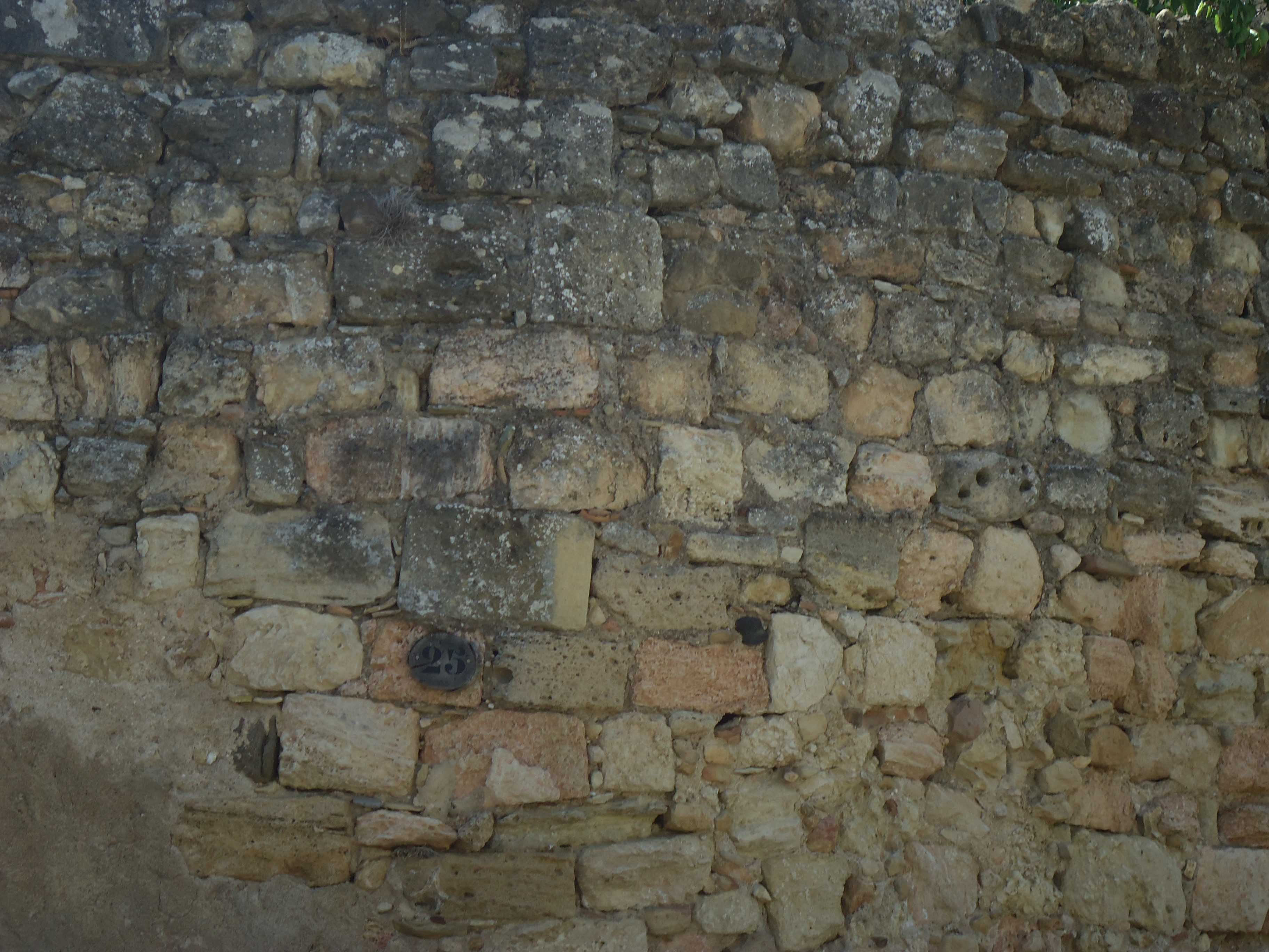 mur servian